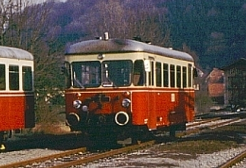 WEG T 23 und 24